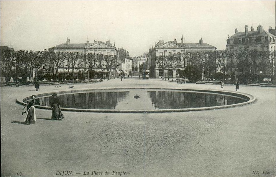 Carte postale ancienne éditée par ND Phot, n°67 : DIJON - Place du Peuple